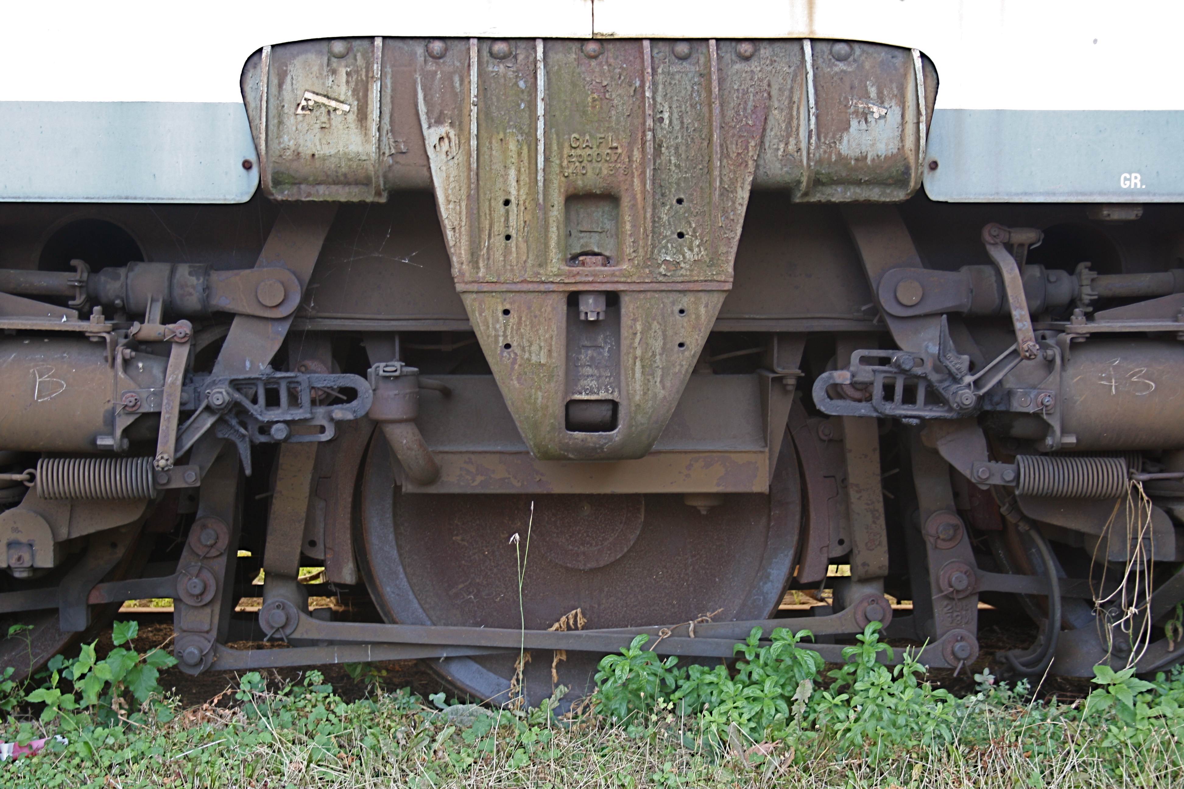 Laufachse in einem Drehgestell einer A1AA1A 68500